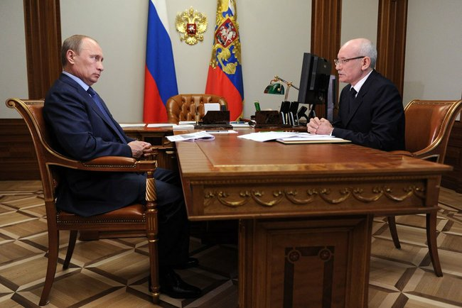 С Главой Республики Башкортостан Рустэмом Хамитовым